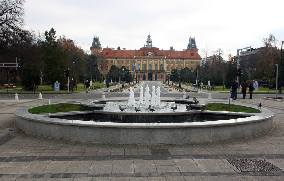 Фонтана и зграда жупаније у позадини у Сомбору, Србија.